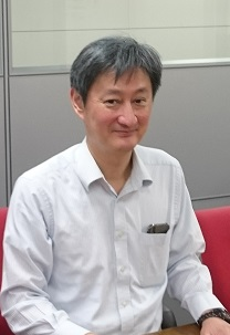 2018/06/20 イノベーションマネジメント研究科にて撮影。